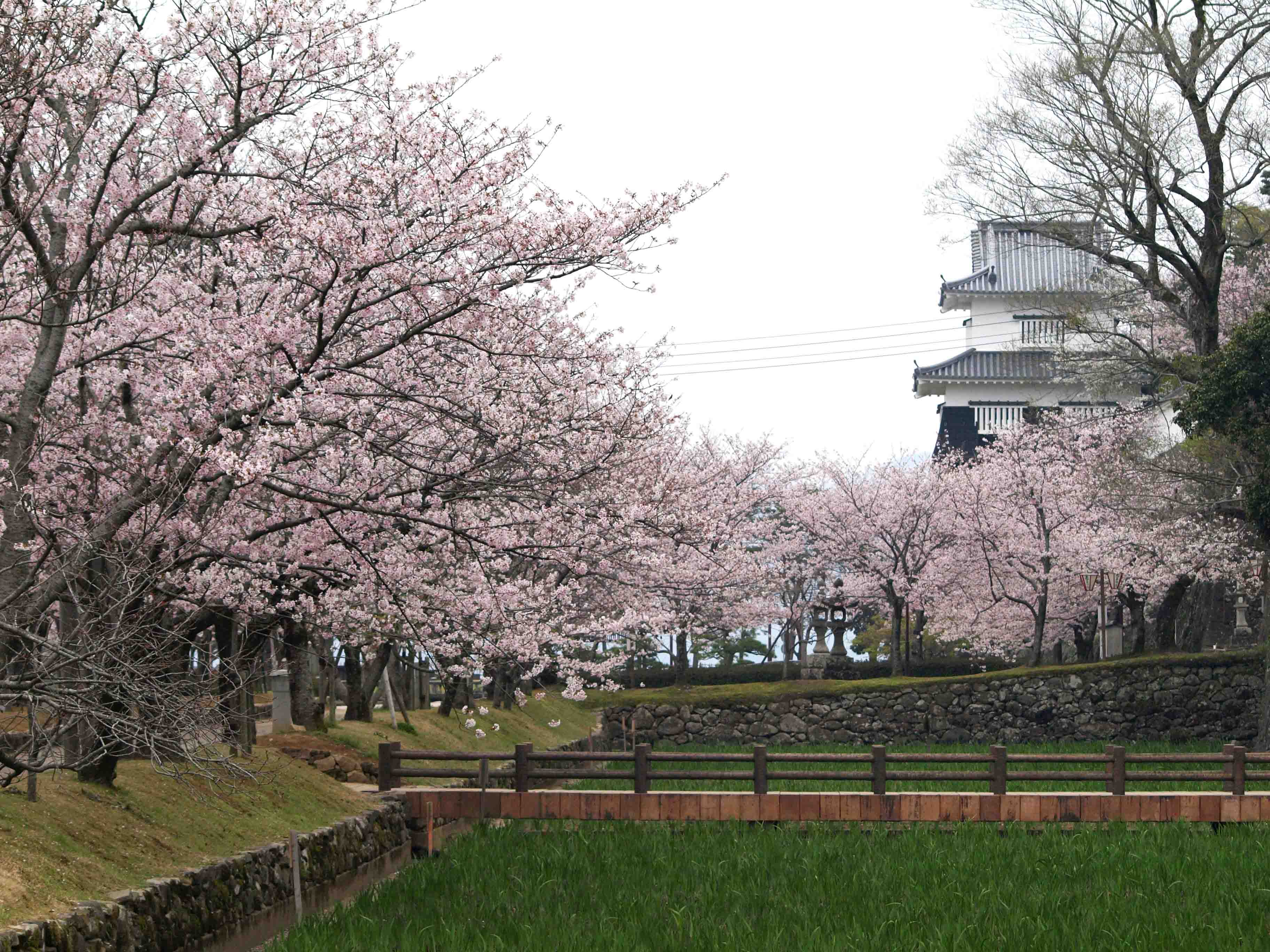 長崎県大村市の大村公園の桜